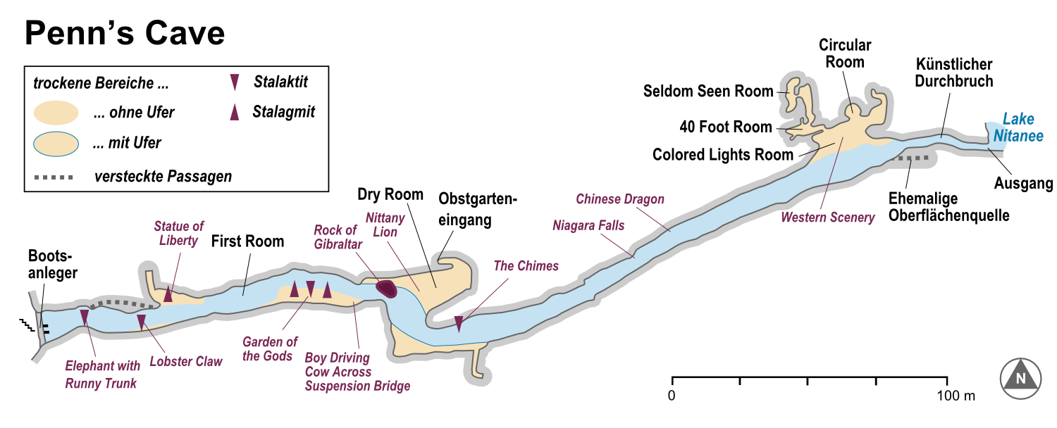 Karte der Penn’s Cave